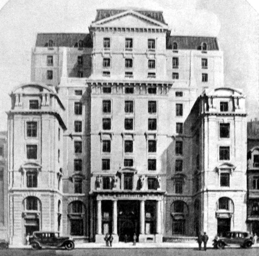 Vista del Edificio Tornquist, obra del arquitecto Alejandro Bustillo. Sede del Banco Tornquist originalmente, luego alojó entre otros al Banco Crédit Lyonnaise. Hoy está desocupado. Calle Bartolomé Mitre nº 523/531/559